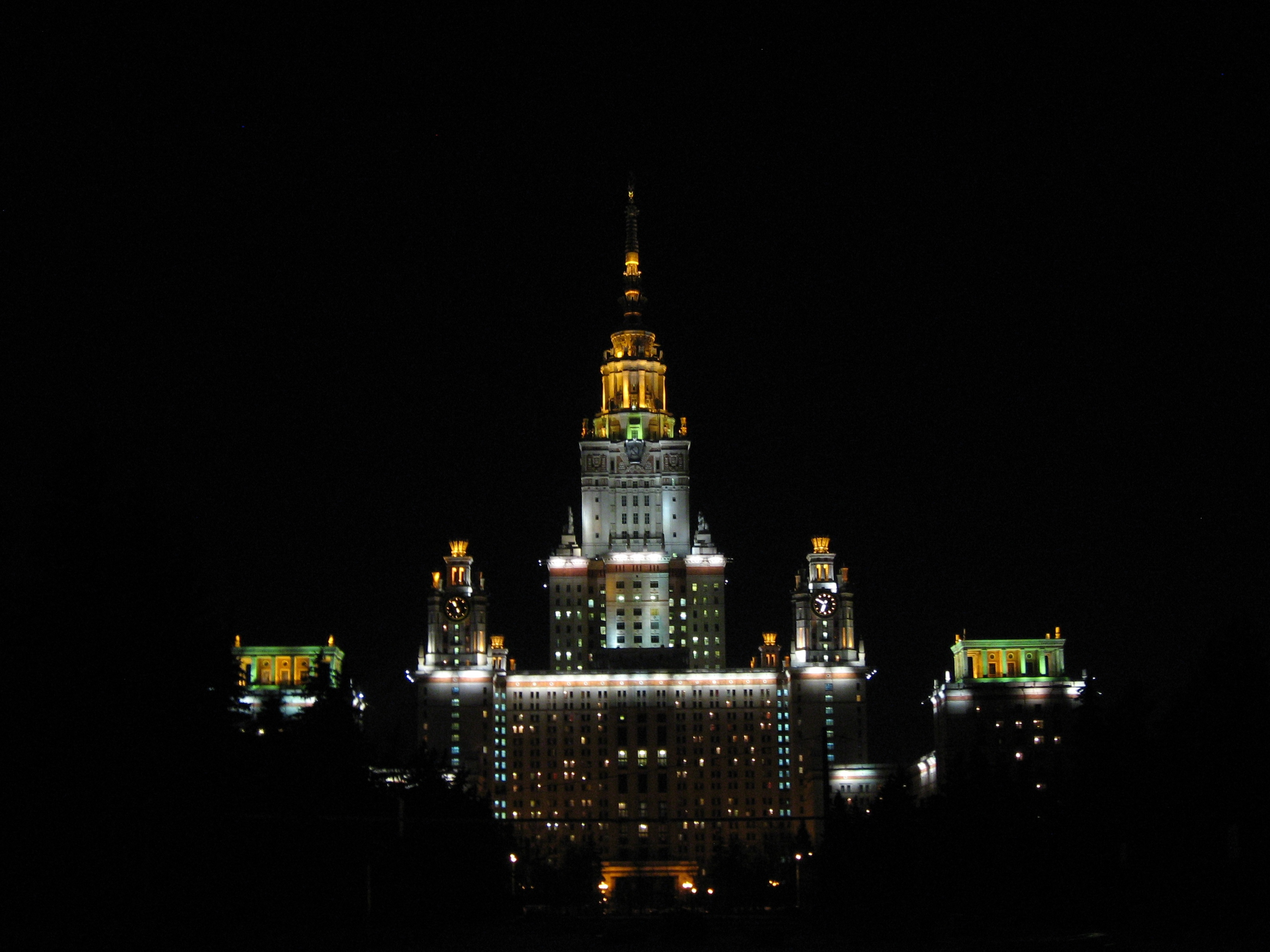 Edificio principal de la Universidad Estatal de Moscú "M.V. Lomonósov".